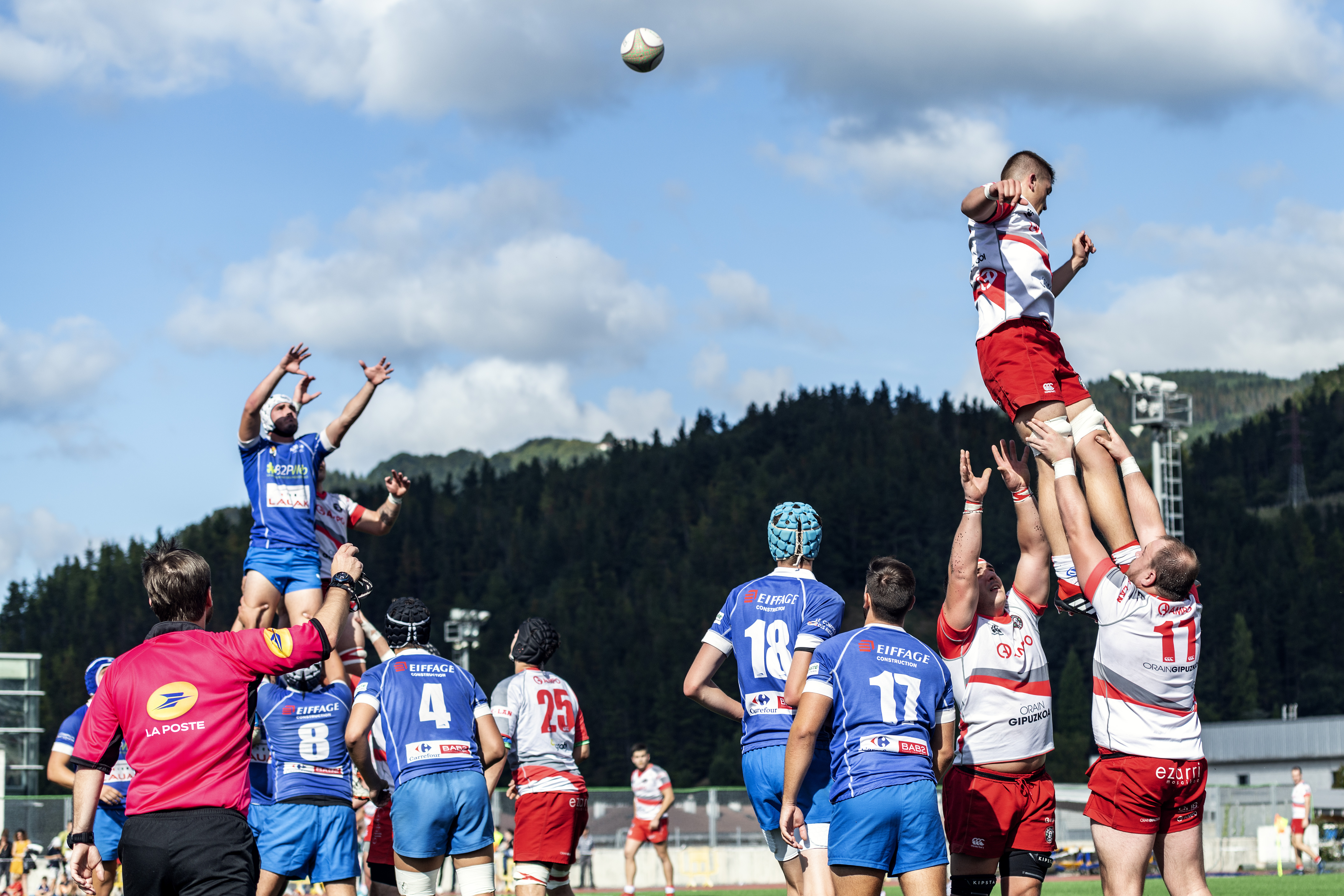 Aviron Bayonnais izan da Euro Basque Rugby Challenge-Euskal Errugbi Ligaren lehen txapelduna